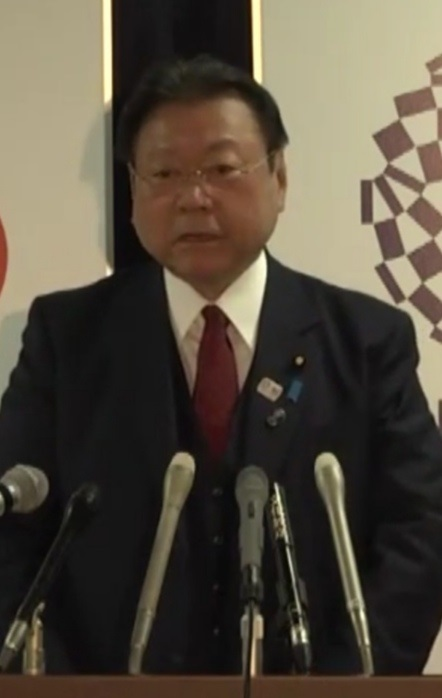 東京オリンピック・パラリンピック競技大会担当国務大臣として記者会見を行う桜田義孝